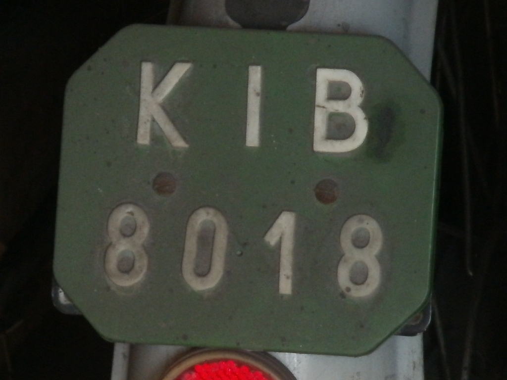 Dawna tablica rejestracyjna motoroweru, lata 80. XX stulecia, województwo kieleckie